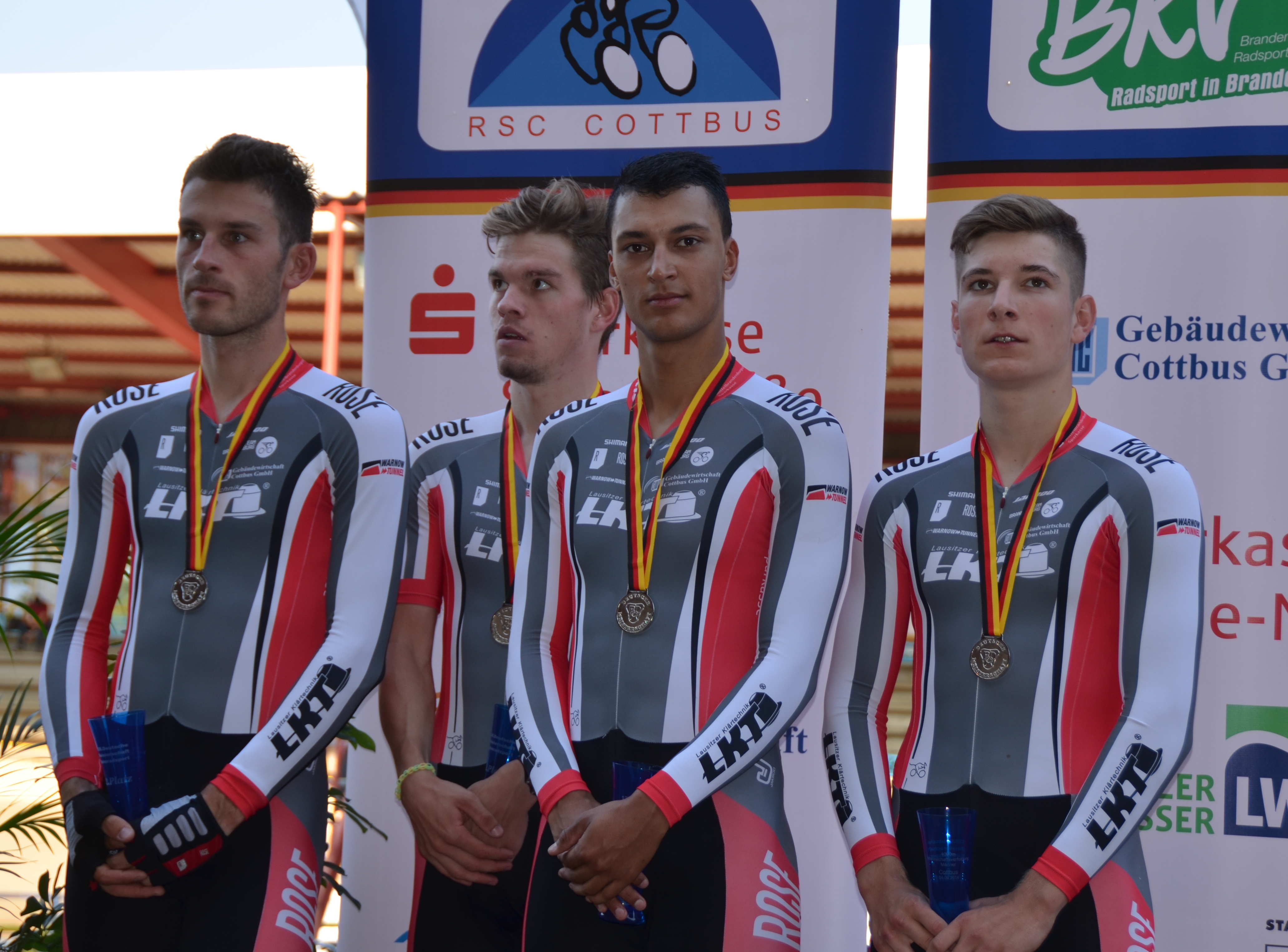 LKT Team Brandenburg, 2. Platz Mannschaftsverfolgung bei der deutschen Meisterschaft in Cottbus, v.l.n.r.: Stefan Schäfer, Franz Schiewer, Leon Rohde, Willi Willwohl The making of this document was supported by the Community-Budget of Wikimedia Germany.